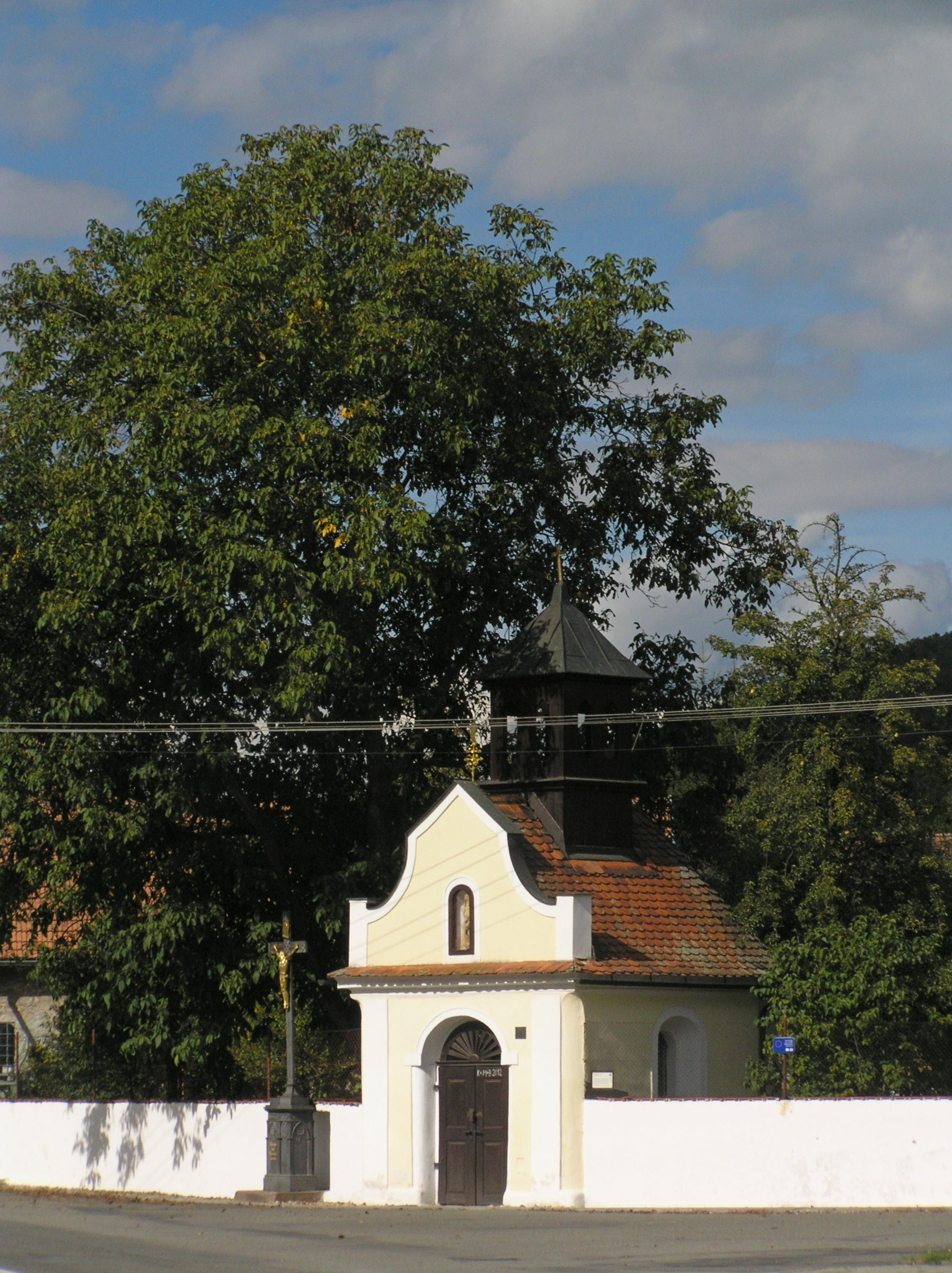 Kaple sv. Anny ve Štěpánovicích(okr. Brno-venkov)